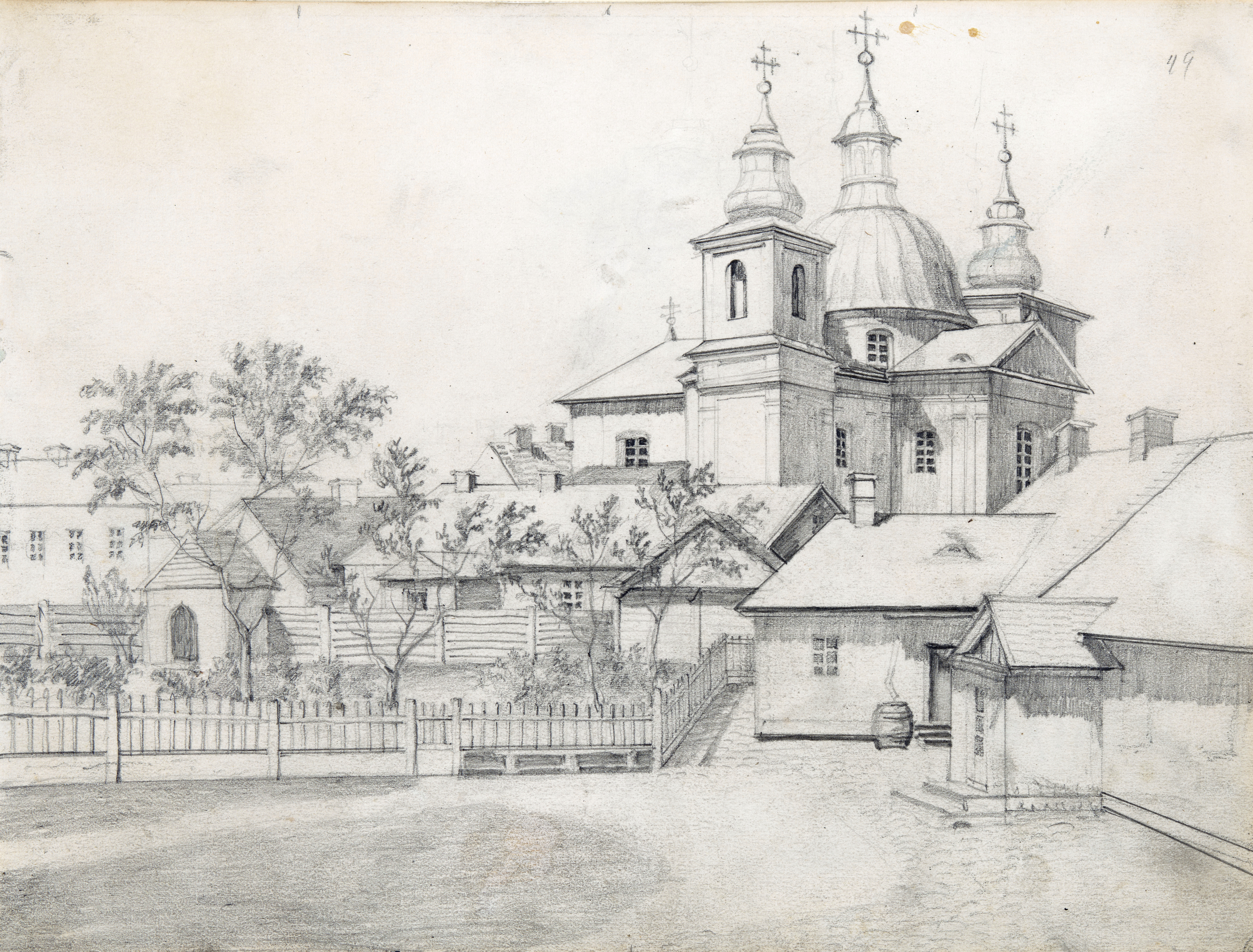 Беларуская (тарашкевіца): Горадня (Horadnia), завулак Пральны (zavułak Pralny). Царква Раства Багародзіцы і манастыр базылянаў